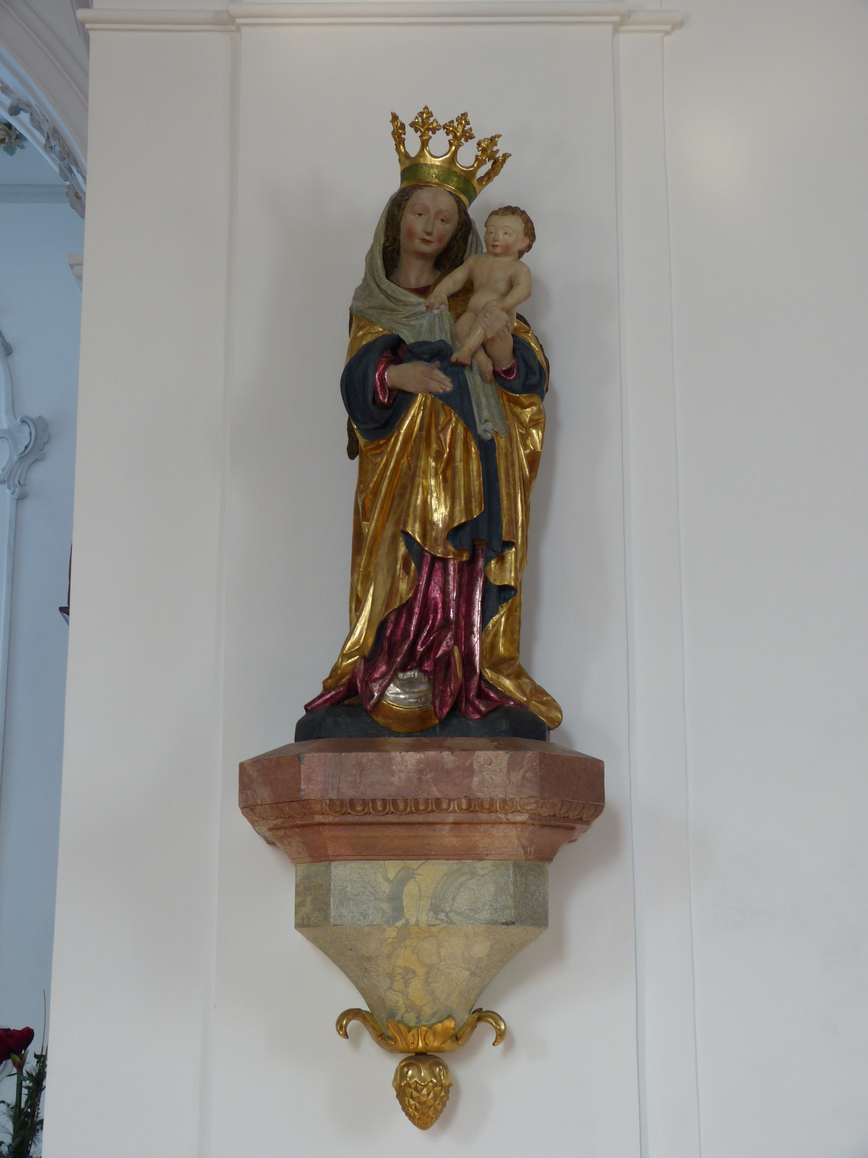 St. Peter und Paul, Lautrach, Landkreis Unterallgäu, Bayern